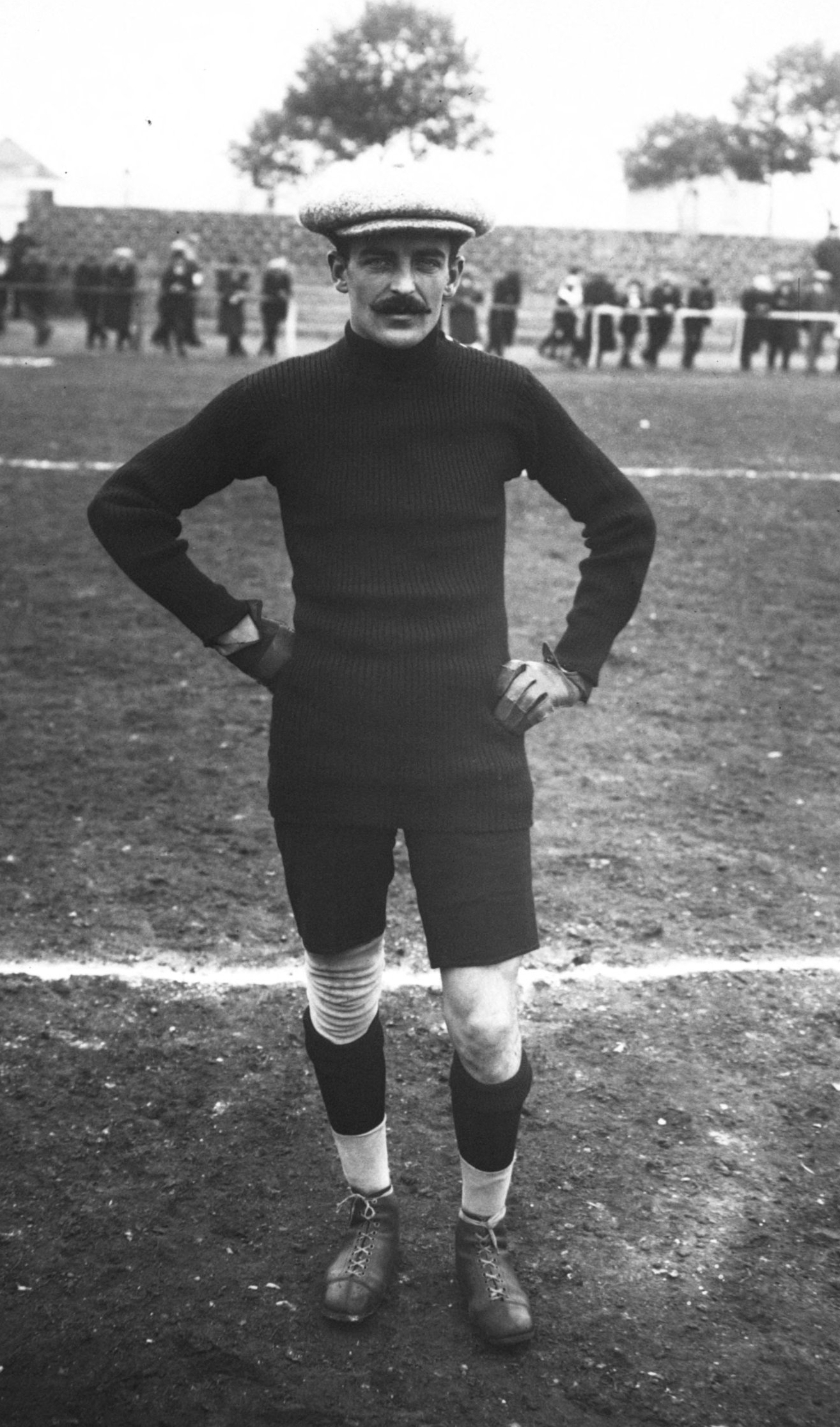 [19-10-13] Scheibenstock, gardien de but du C.A.P. [Cercle athlétique de Paris].